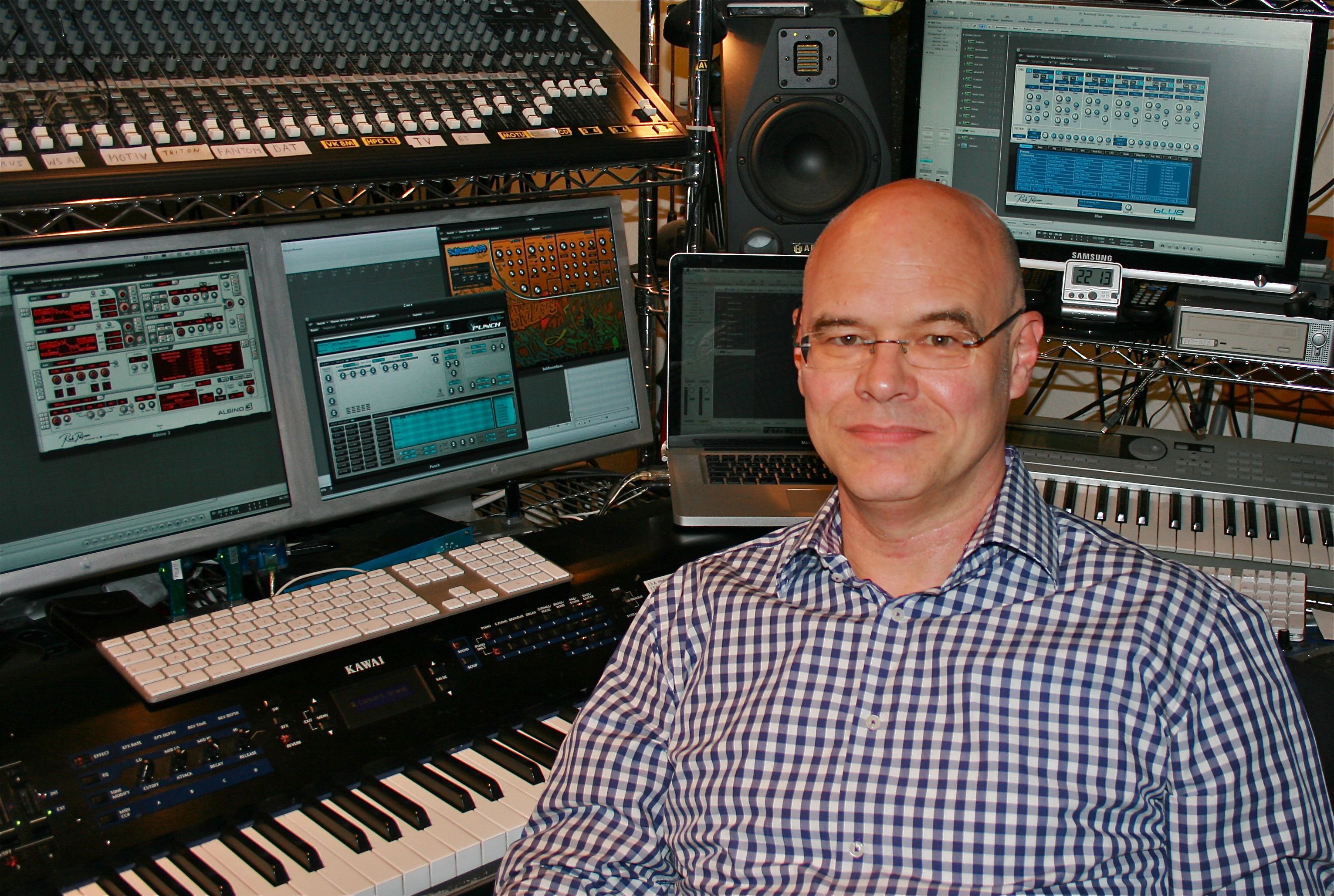 Christoph Spendel in seinem Frankfurter Studio